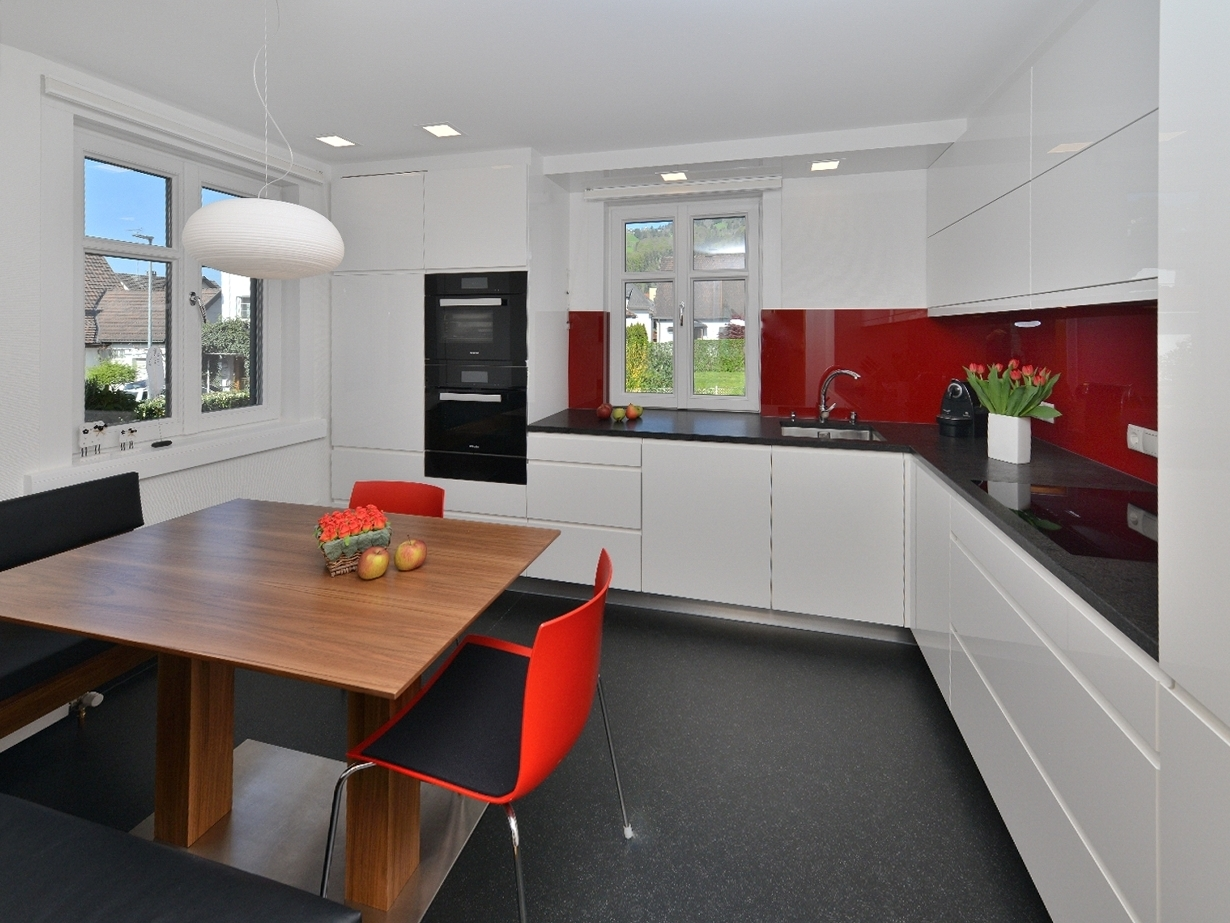 Küche / Einbauküche aus Holzwerkstoffen, in typischer L-Form, 2015 gefertigt von einem Tischler.